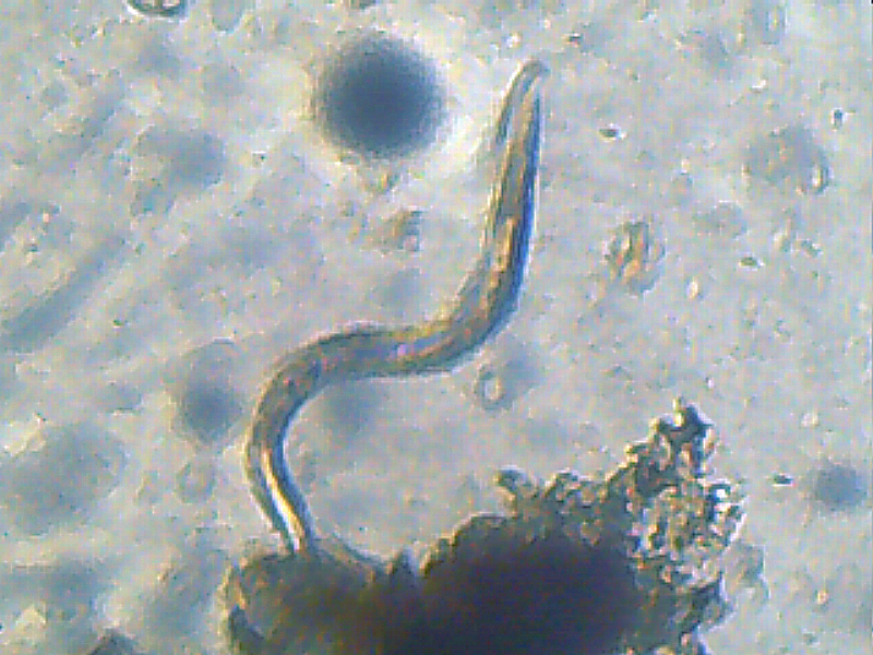 Meloidogyne chitwoodi op Wortel Daucus carota 'Amsterdamse Bak' (maiswortelknobbelaaltje)